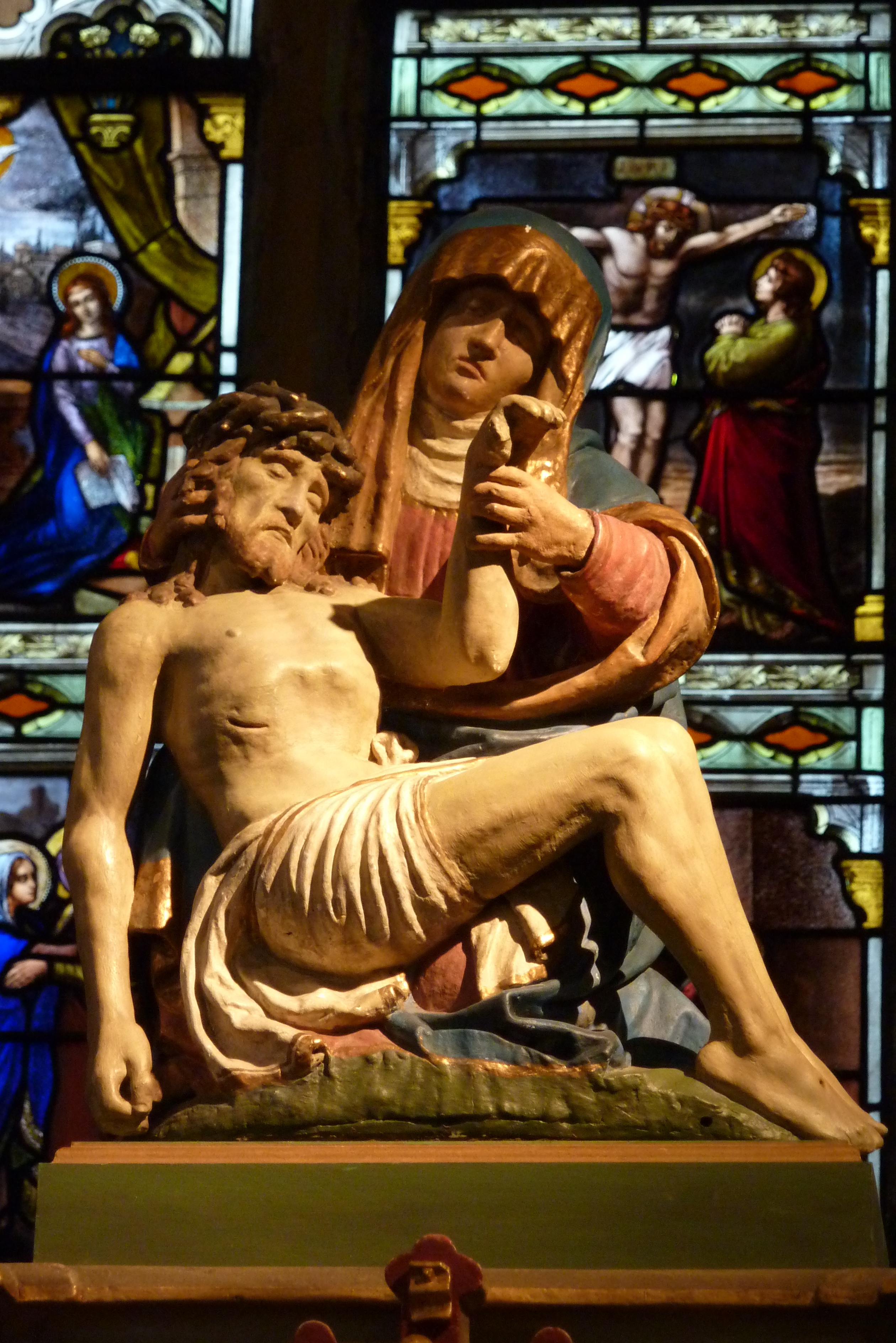 Pieta in der Kirche Saint-Martin in Rustroff